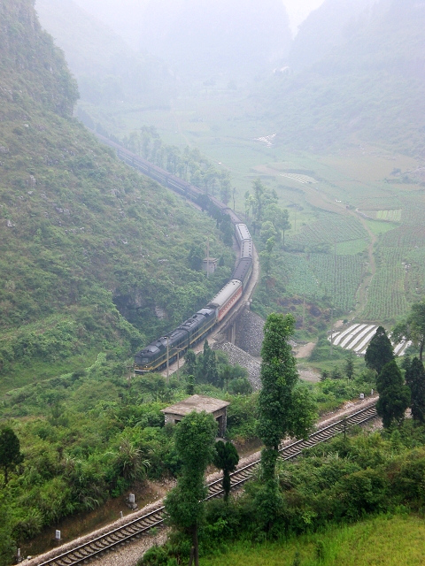 DF7D型机车牵引2304次列車在拉易展線